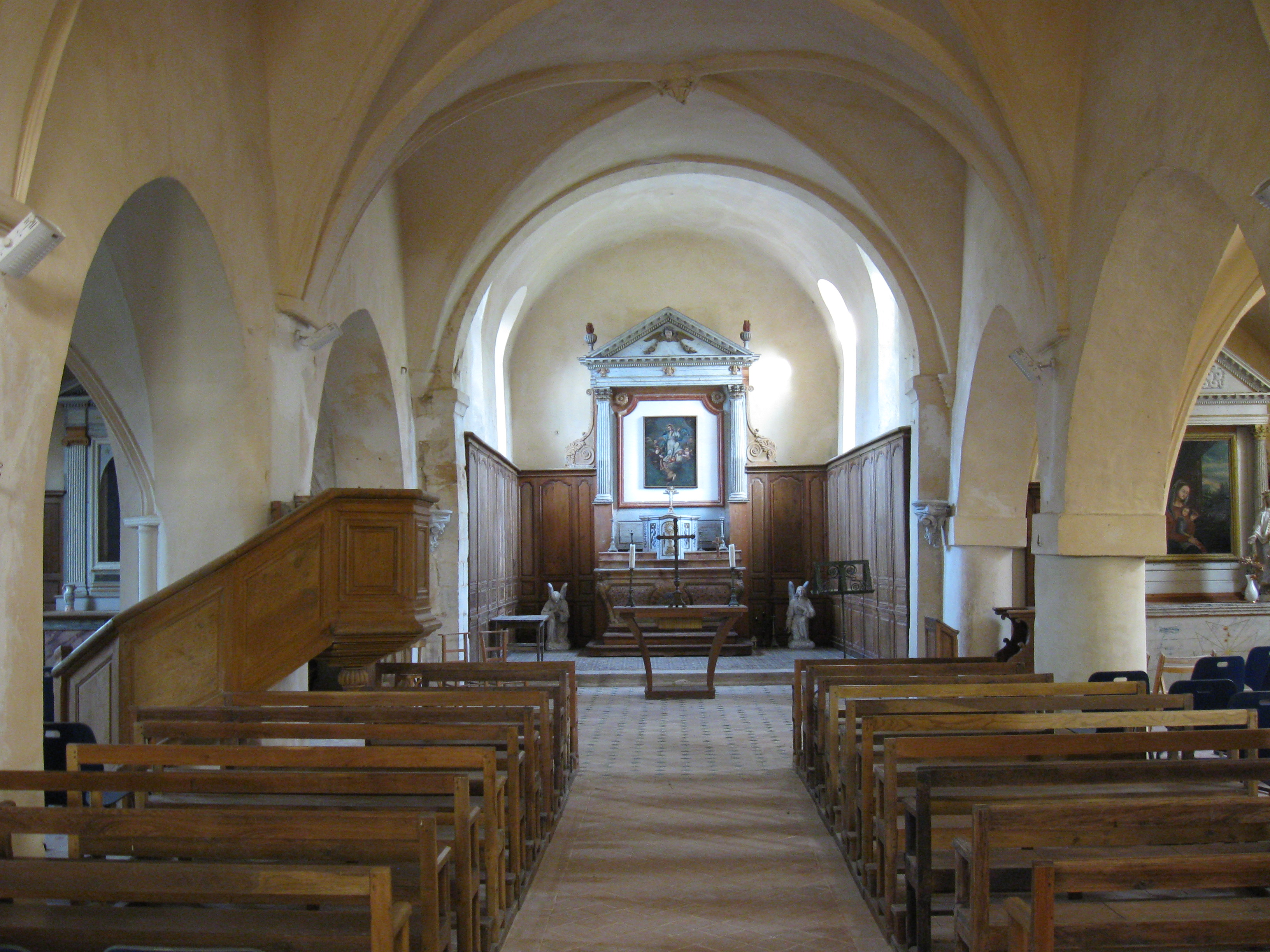 Intérieur de l'église Saint-Rufin-et-Saint-Valère de Bézu-le-Guéry. (département de l'Aisne , région Picardie).